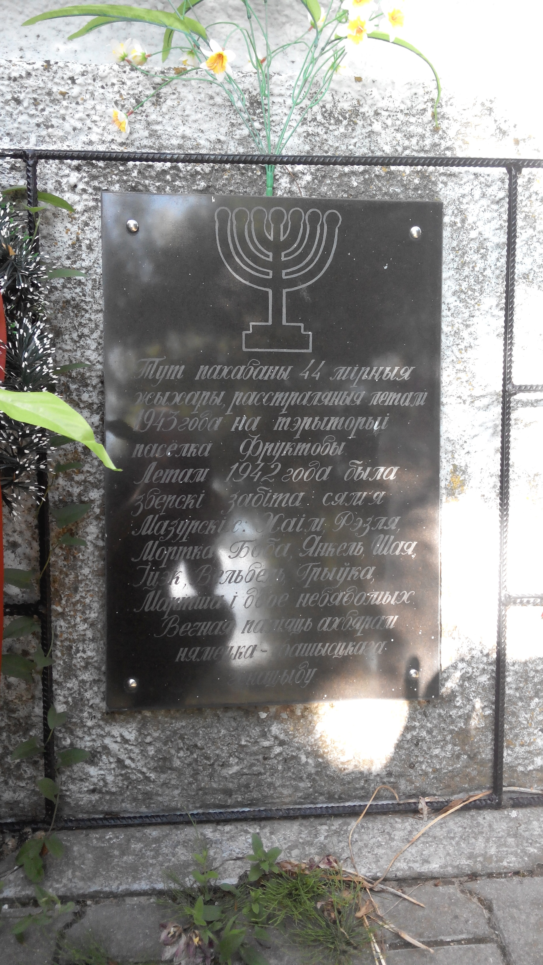 Памятник евреям Кобрина, убитым во время Холокоста.